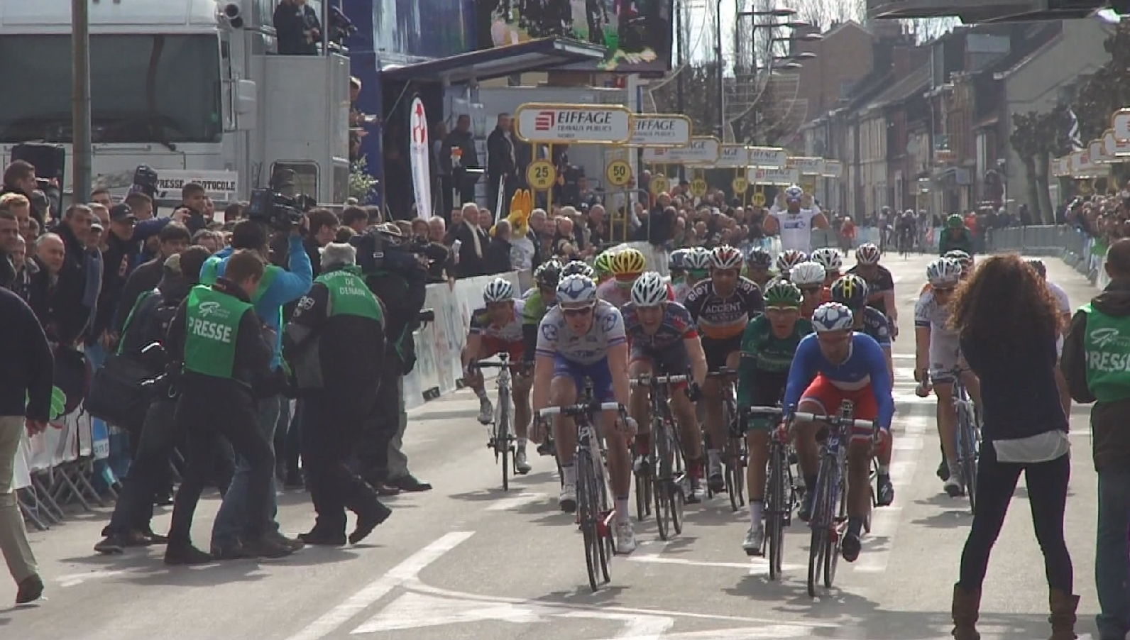 Reportage photographique réalisé le mardi 11 avril 2013 durant l'édition 2013 du Grand Prix de Denain à Denain, Nord, Nord-Pas-de-Calais, France. Depicted people: Arnaud Démare, Bryan Coquard and Nacer Bouhanni